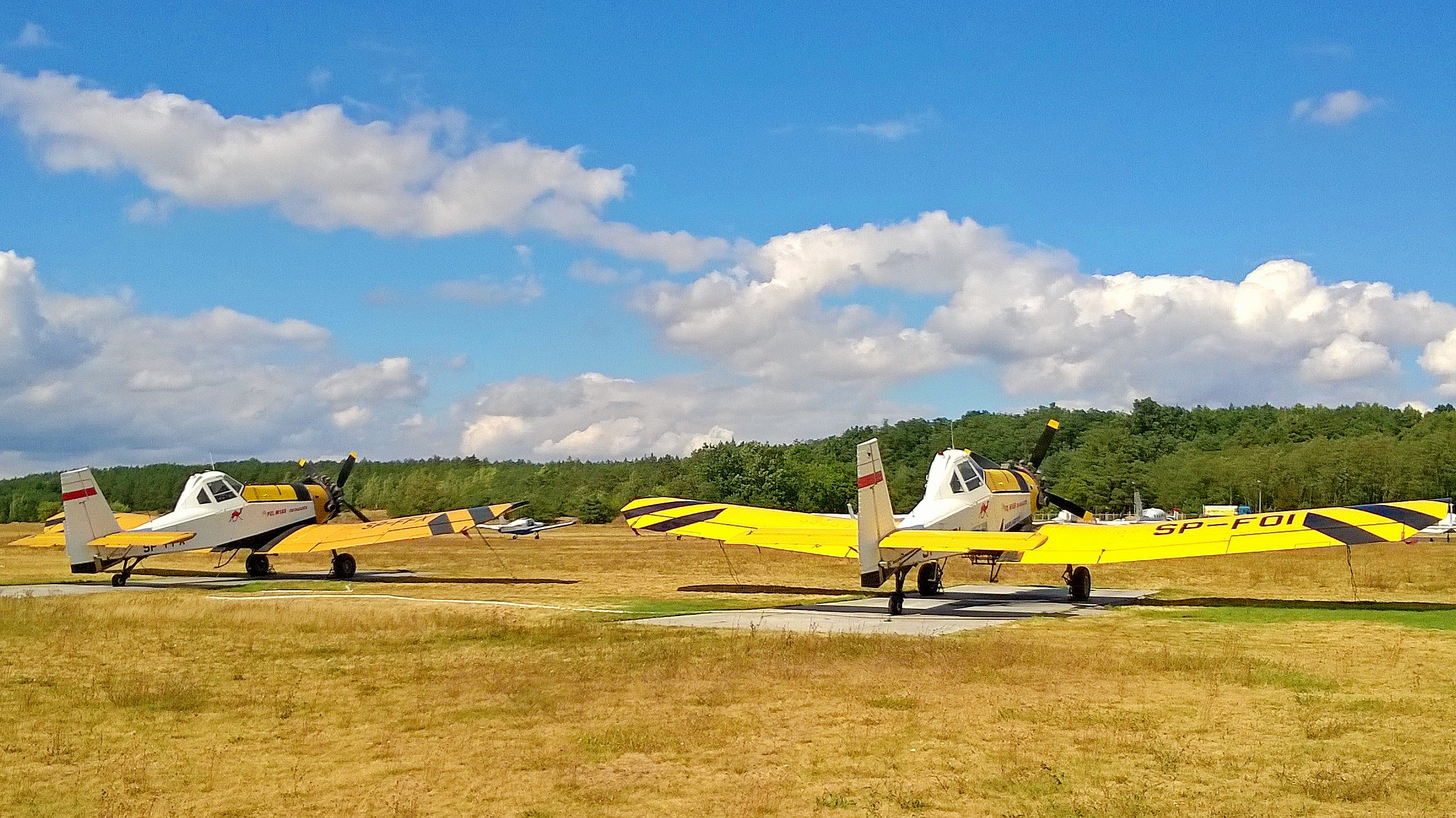 Lotnisko w Toruniu9